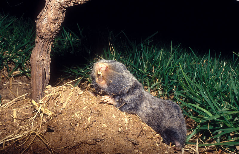 Middle East Blind Mole Rat or Palestine Mole Rat (Nannospalax ehrenbergi or Spalax ehrenbergi)